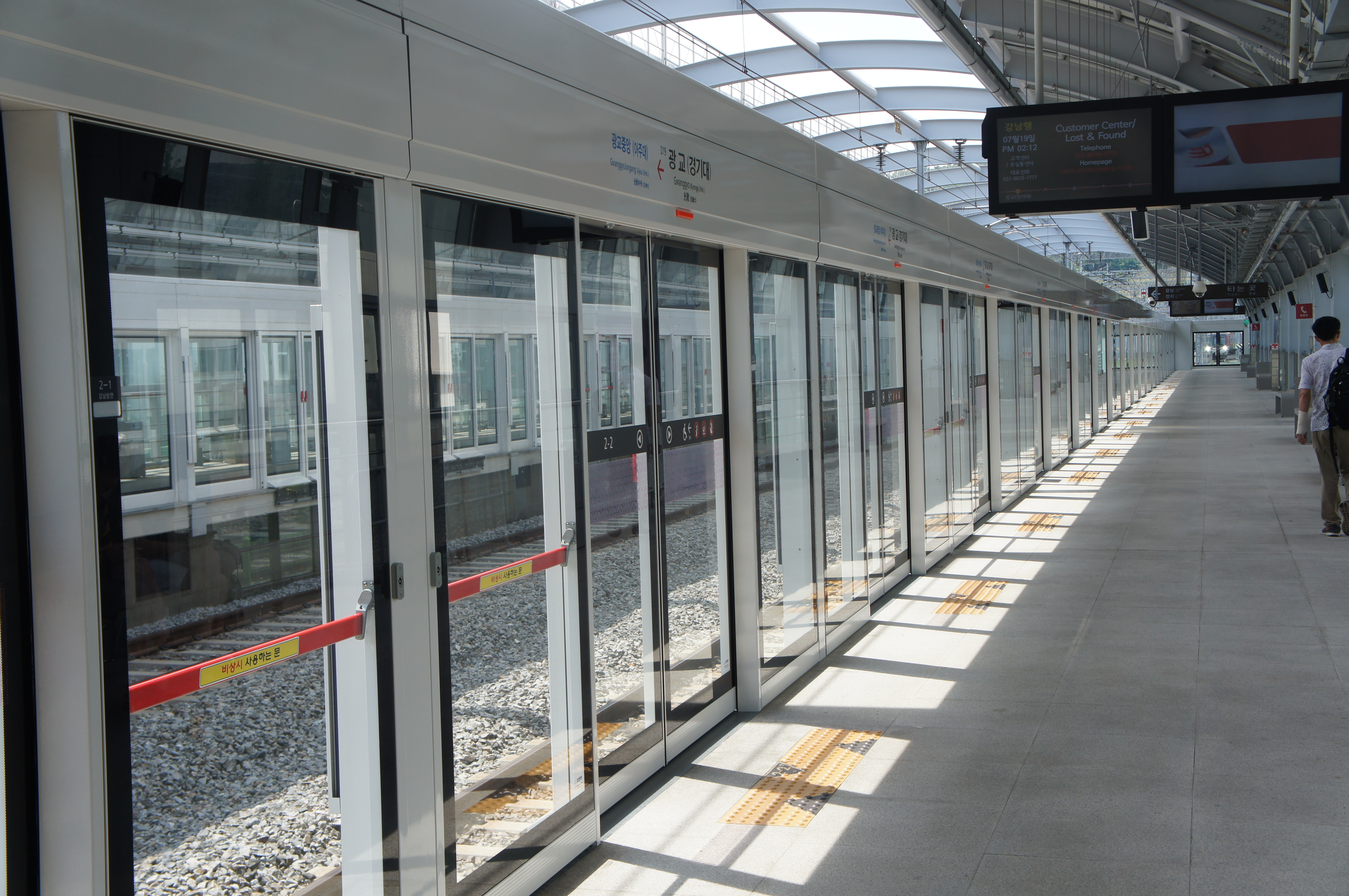 광교역 승강장